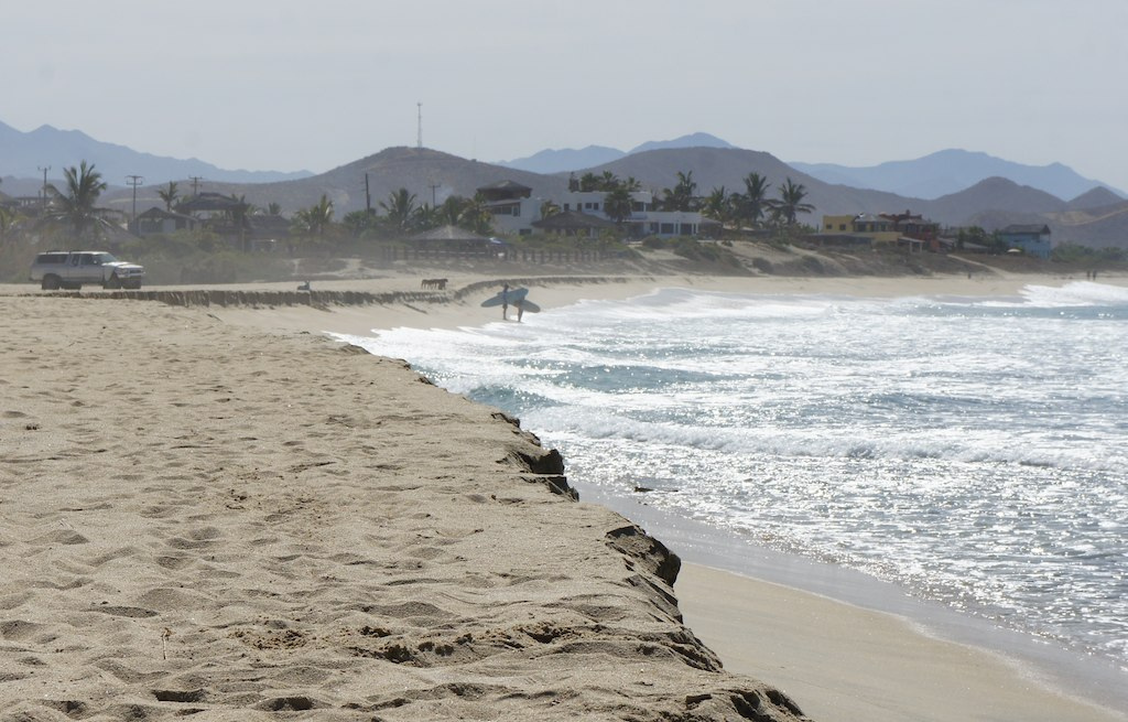 Baja California Sur.